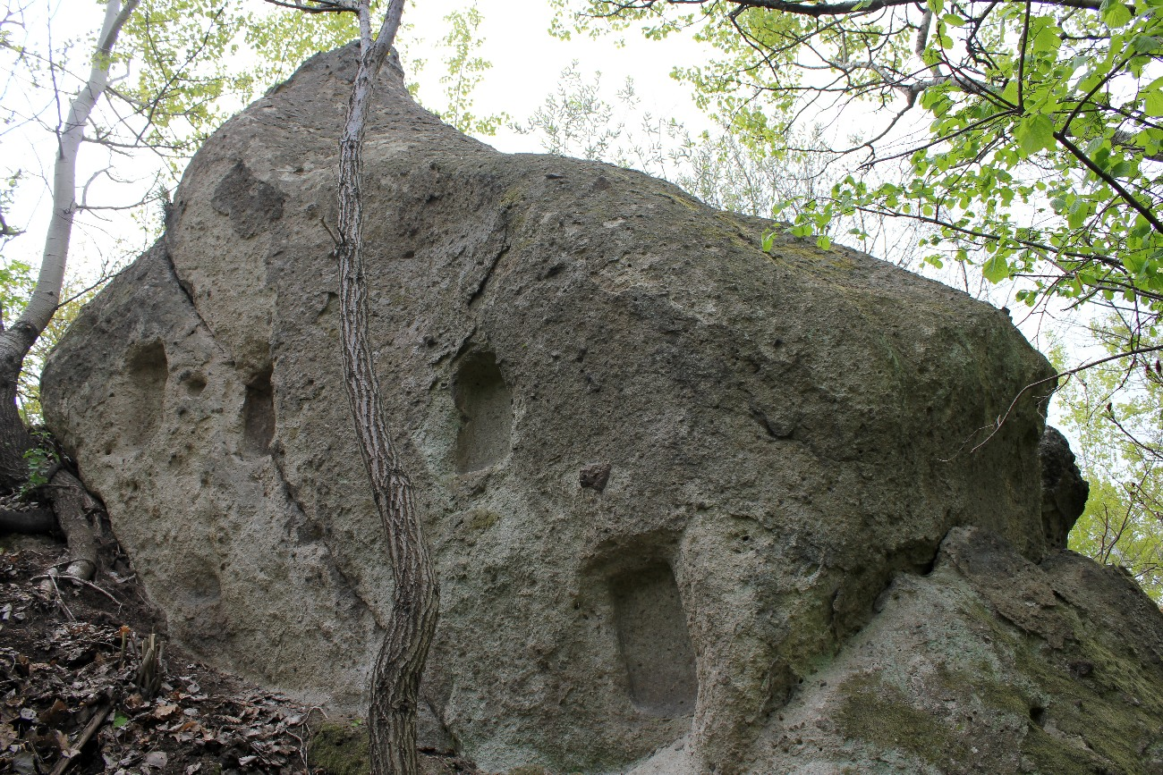 H2d, Eger, Nyerges, K.